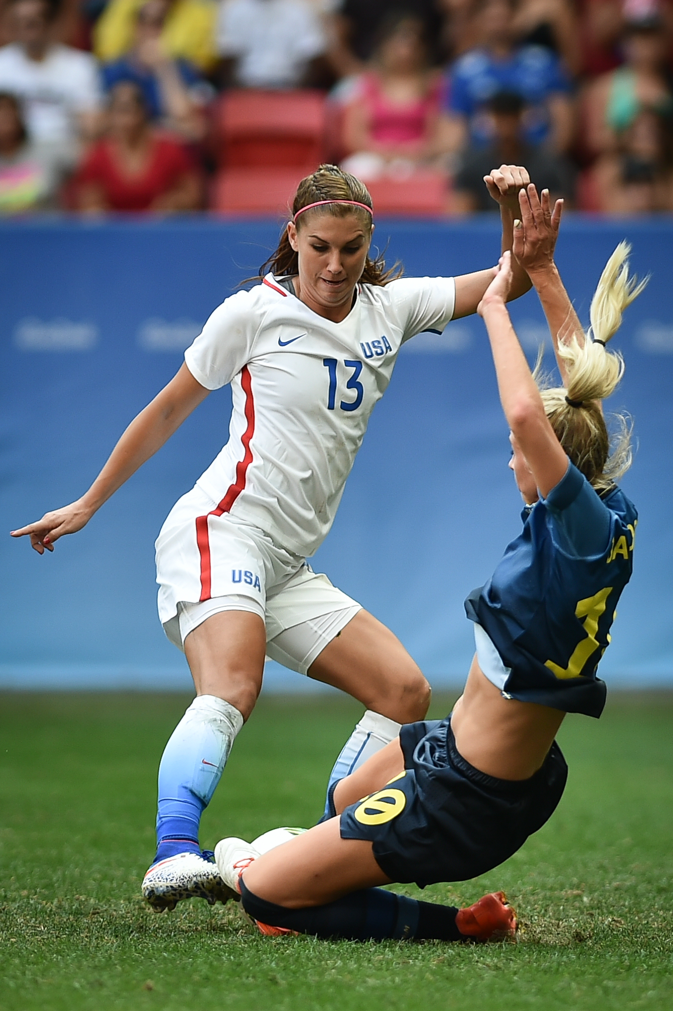 Estádio Nacional de Brasília Mané Garrincha, Brasília, DF, Brasil, 12/8/2016 Foto: Andre Borges/Agência Brasília. Estados Unidos e Suécia jogam nesta sexta-feira (12), no Estádio Mané Garrincha, pelas quartas de final do futebol feminino na Olimpíada 2016.